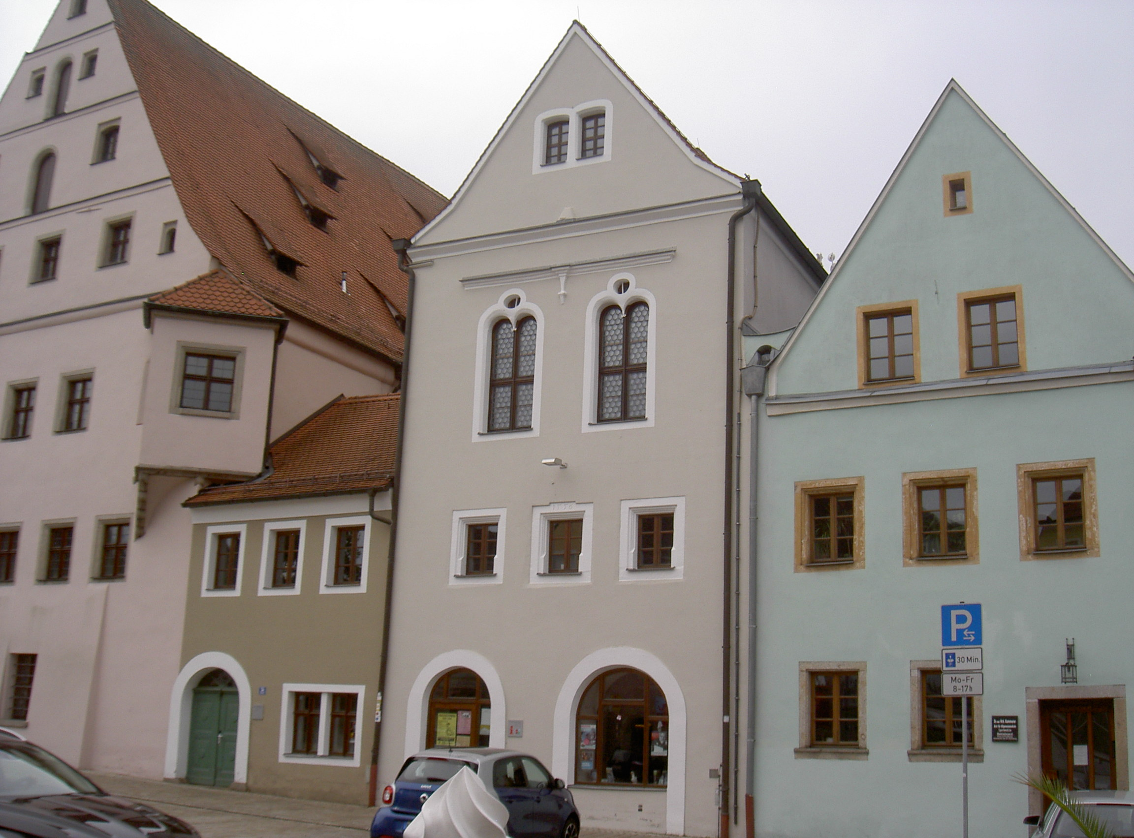 Stadtplatz 34 (Neustadt an der Waldnaab)